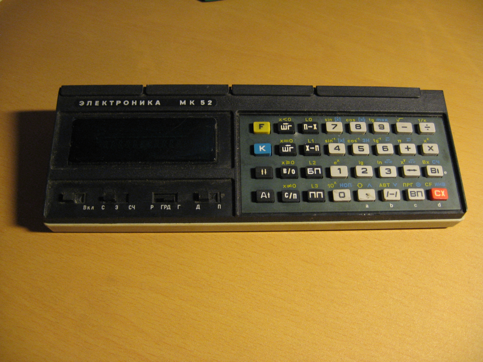 NSVL kalkulaator